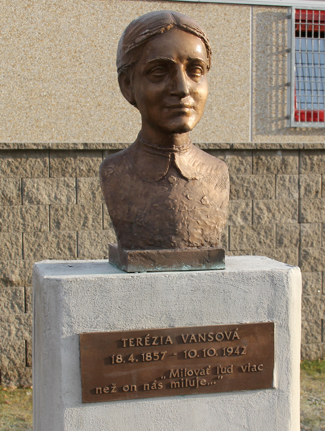 Bronzová busta slovenskej spisovateľky a redaktorky Terézii Vansovej na Námestí Štefana Marka Daxnera v Rimavskej Sobote